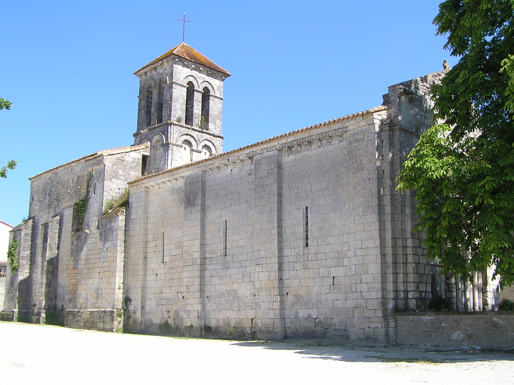 église de Plaizac, Charente, France